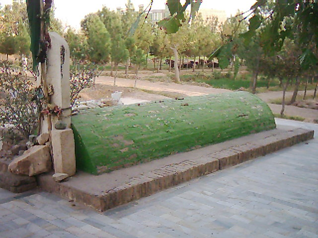 مزار مولانا حسین واعظ کاشفی